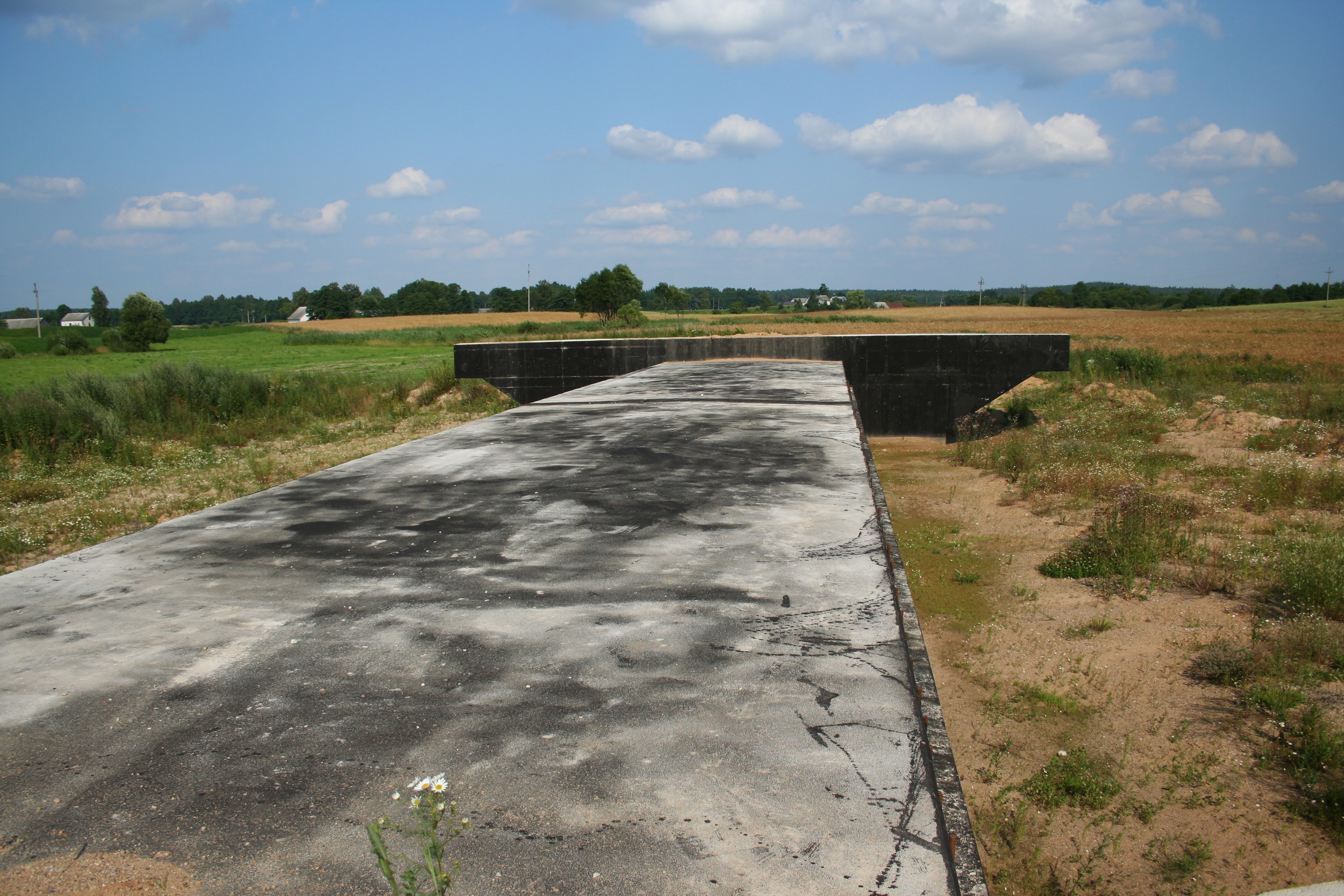 fragment szkieletu niedokończonej budowy obwodnicy Augustowa, Gatno